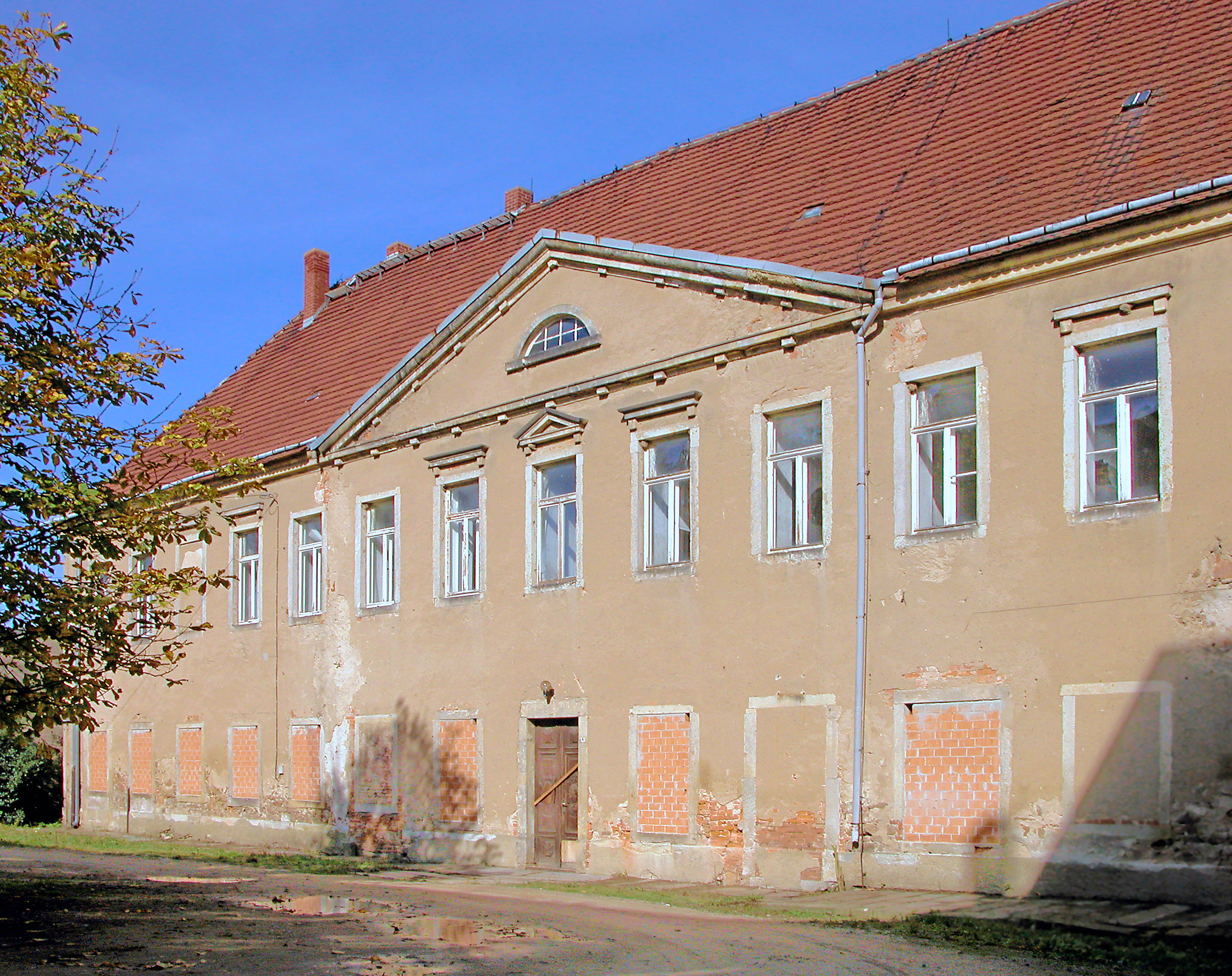 Schloss Weistropp. Nordflügel (1662), Südfassade zum Hof.